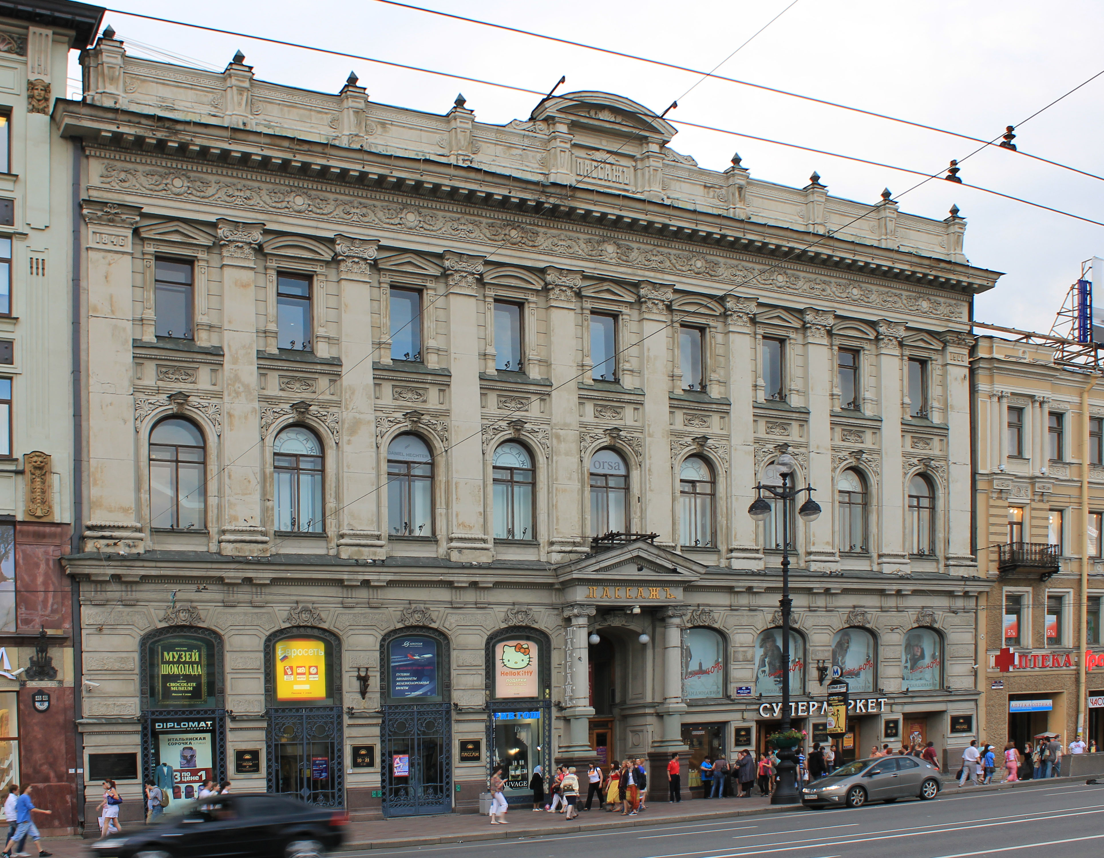 Невский проспект, дом 48